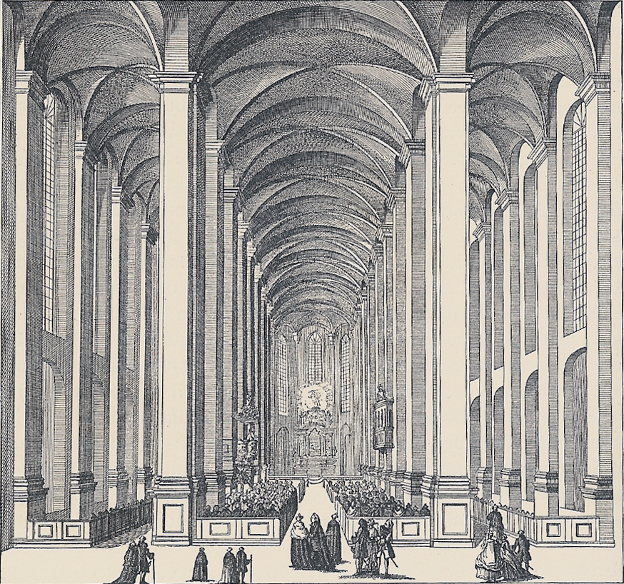 Interiør fra Vor Frue Kirke i København fra første halvdel af 1700-tallet.